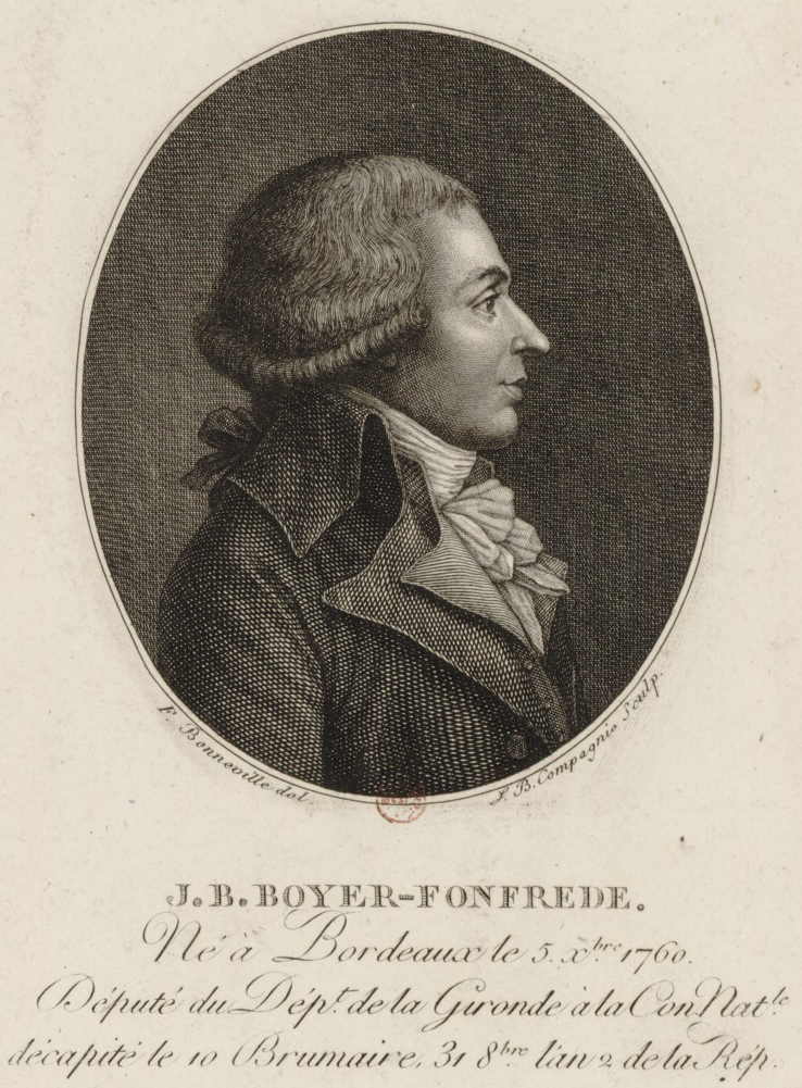 Jean-Baptiste Boyer-Fonfrède (1760–1793), député à la Convention nationale.